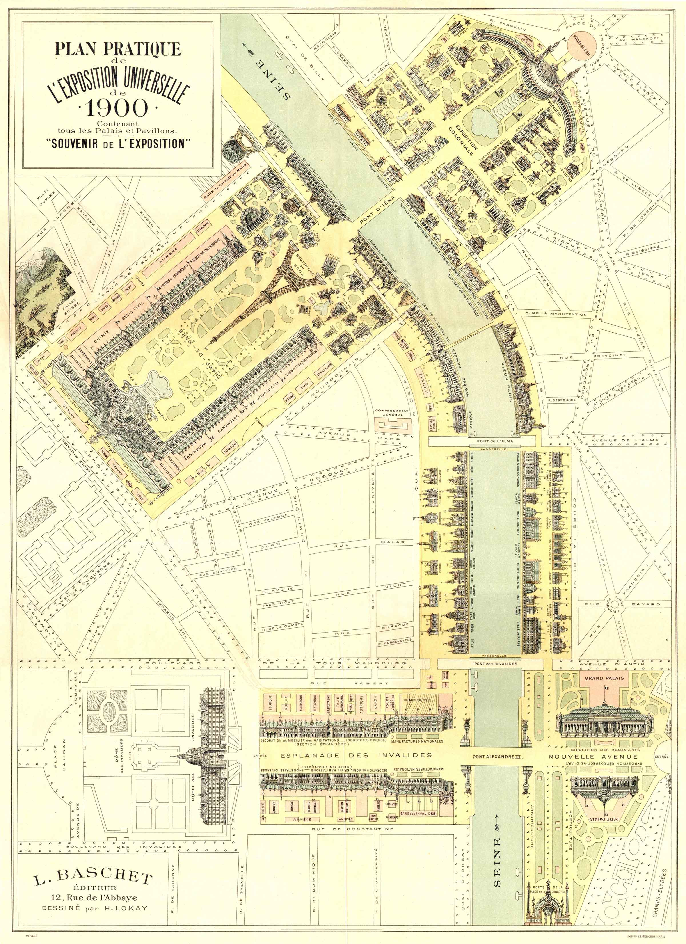 Plan Pratique de l'Exposition Universelle de 1900 ...contenant tous les Palais et Pavillons "Souvenirs de l'Exposition" Format 50x70 cm Supplément au Panorama Editeur Ludovic Baschet 12. rue de l'Abbaye Paris 1900 Dessin de H. Lokay